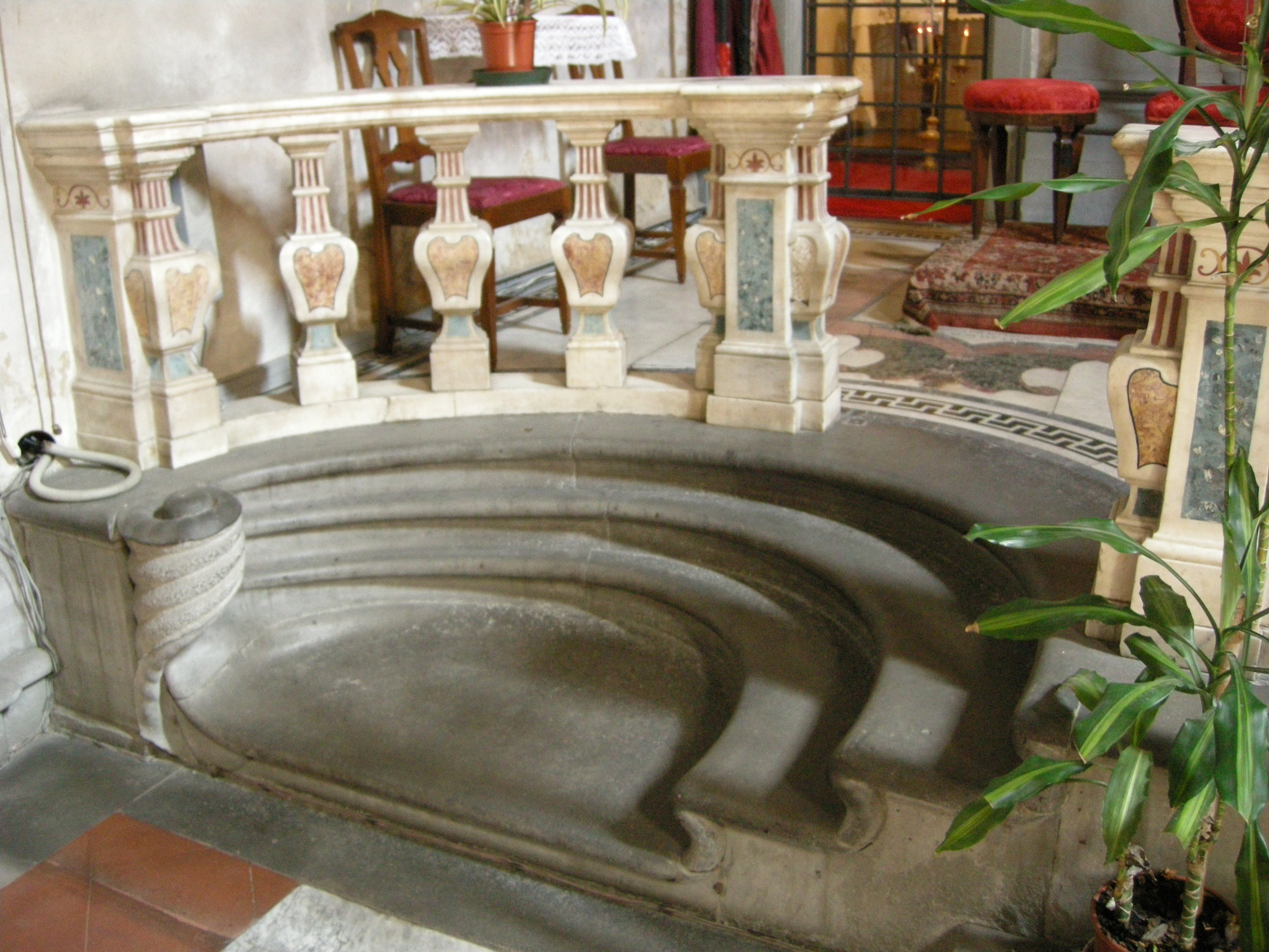 Sant'egidio (firenze), interno, scaletta del buontalenti